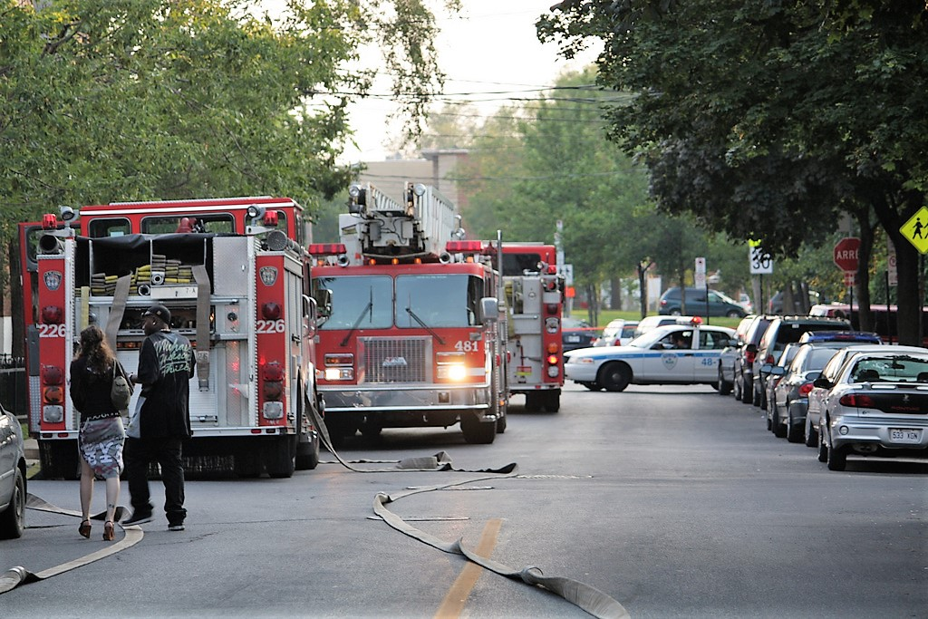 Scène d'incendie dans Rosemont à Montréal, Quebec.